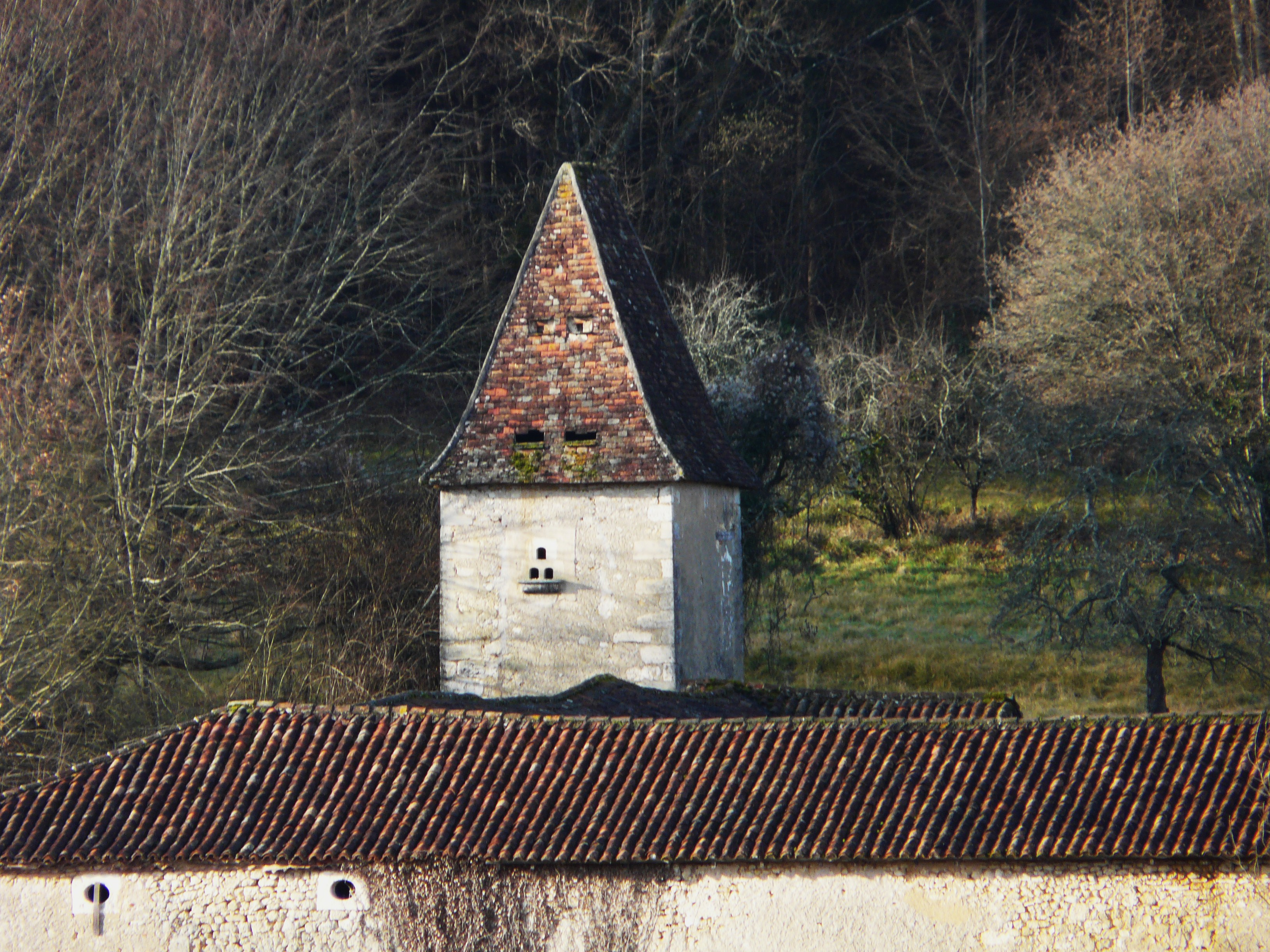 Pigeonnier, manoir du Repaire, Saint-Front-d'Alemps, Dordogne, France Object location45° 19′ 39.8″ N, 0° 45′ 58.7″ E .